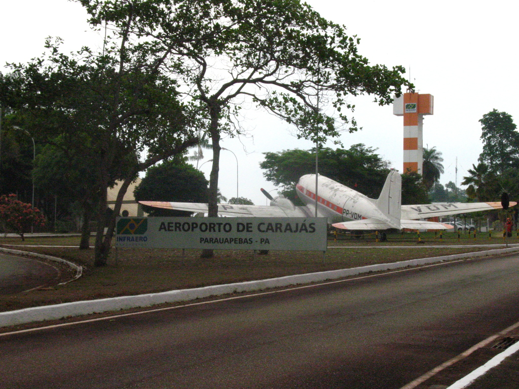 Entrada do Aeroporto de Carajás na cidade de Parauapebas.